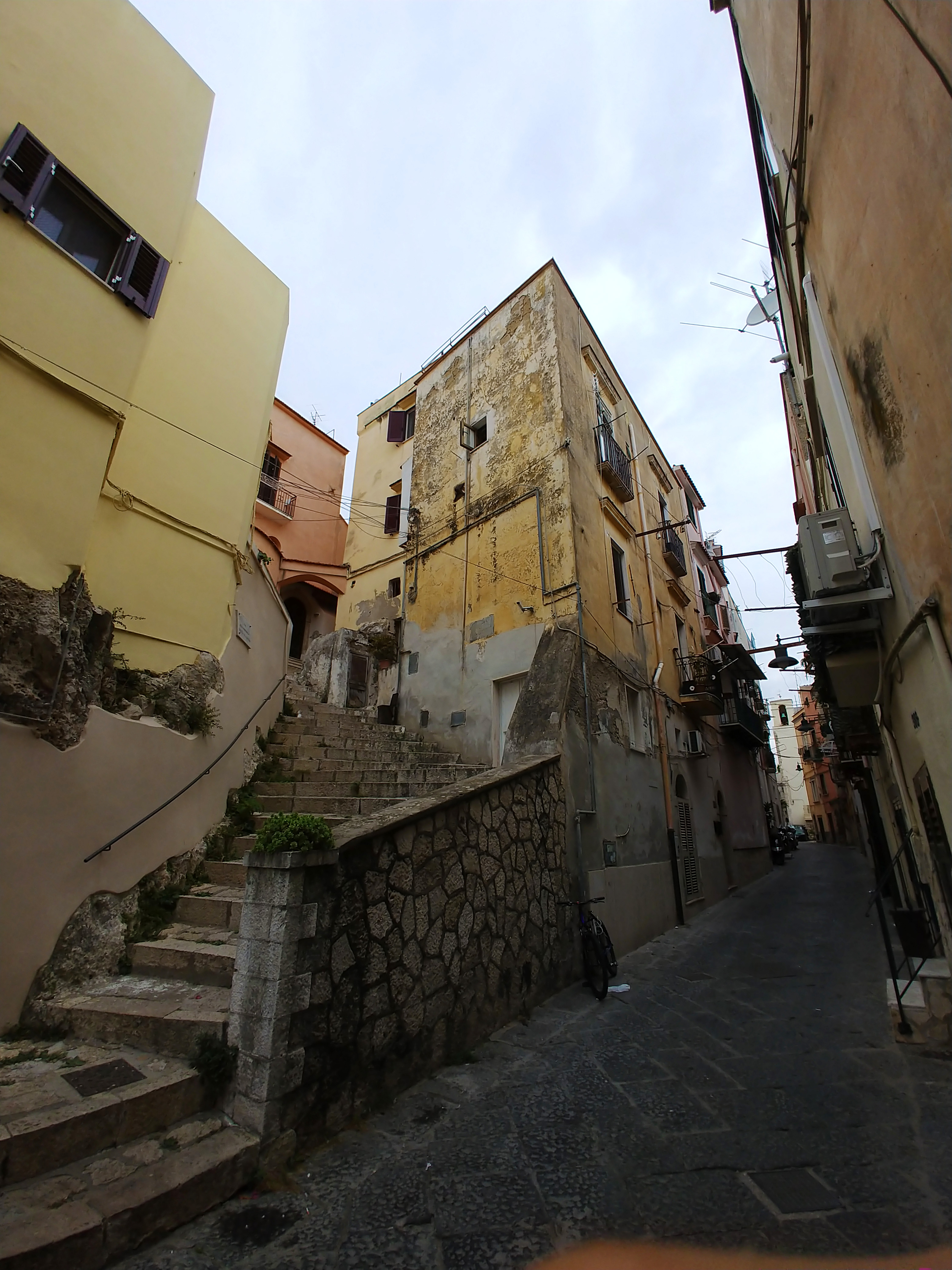 Via della Indipendenza e la salita 4 "a Castello".